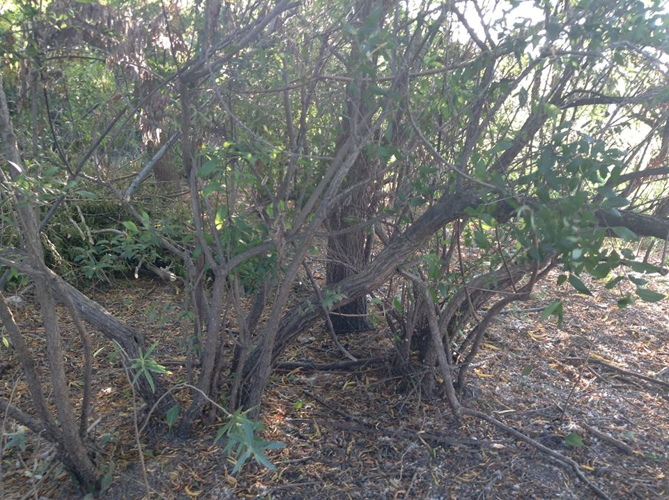 Reserva Natural Del Pilar, Buenos Aires, Argentina